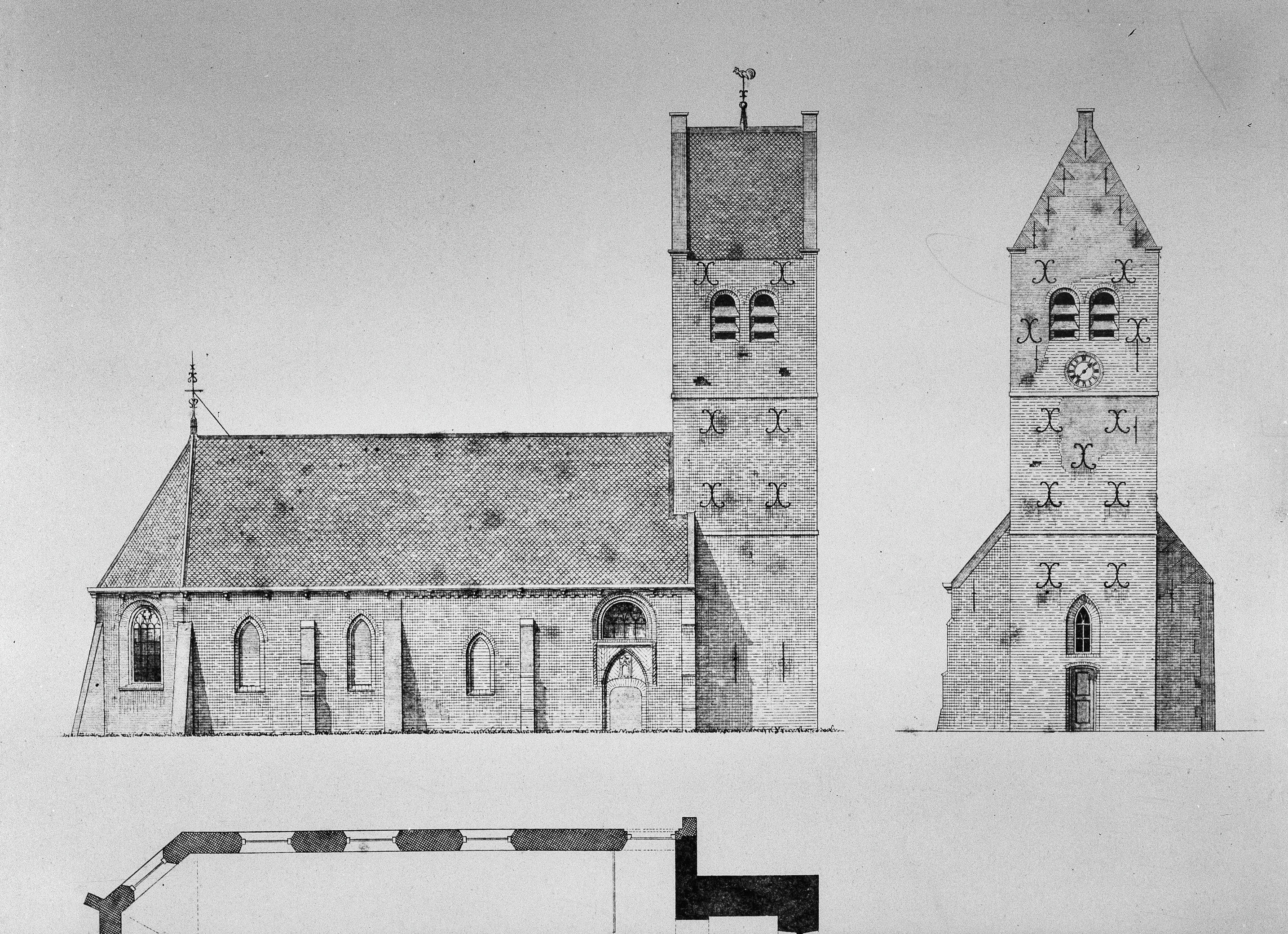 N.H.Kerk: naar tekening in archief